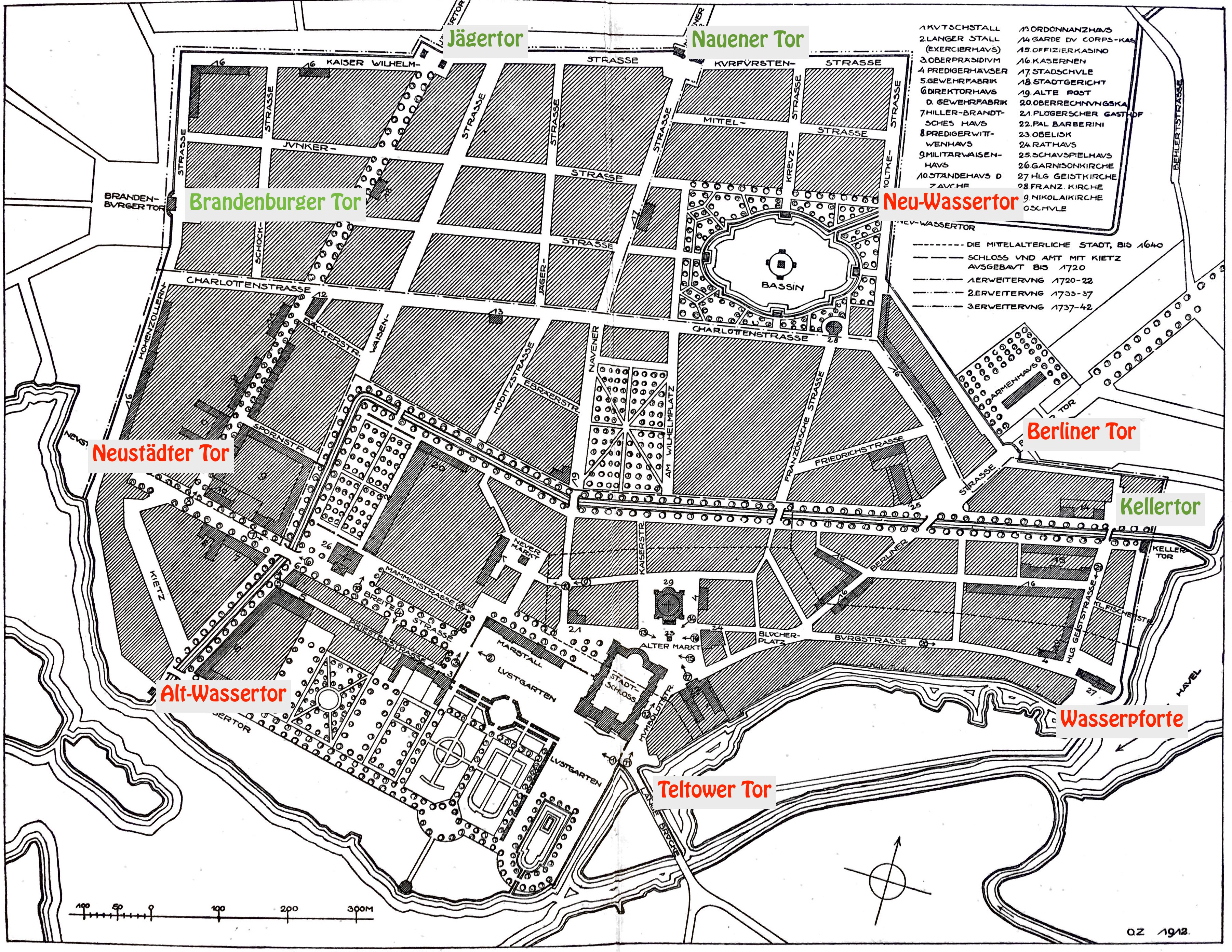 Karte der Potsdamer Stadttore